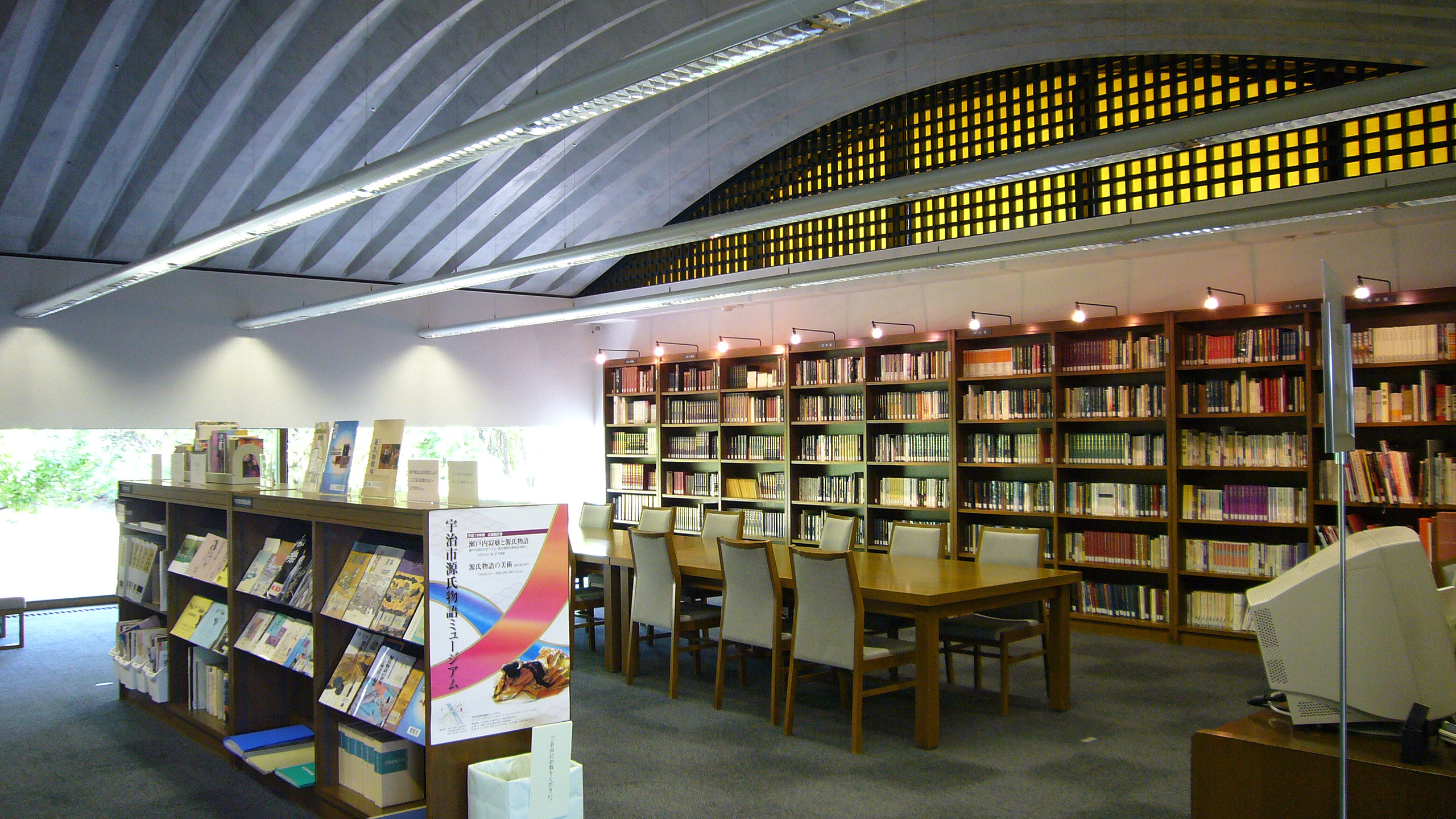 Genji museum in Uji, Kyoto, Japan